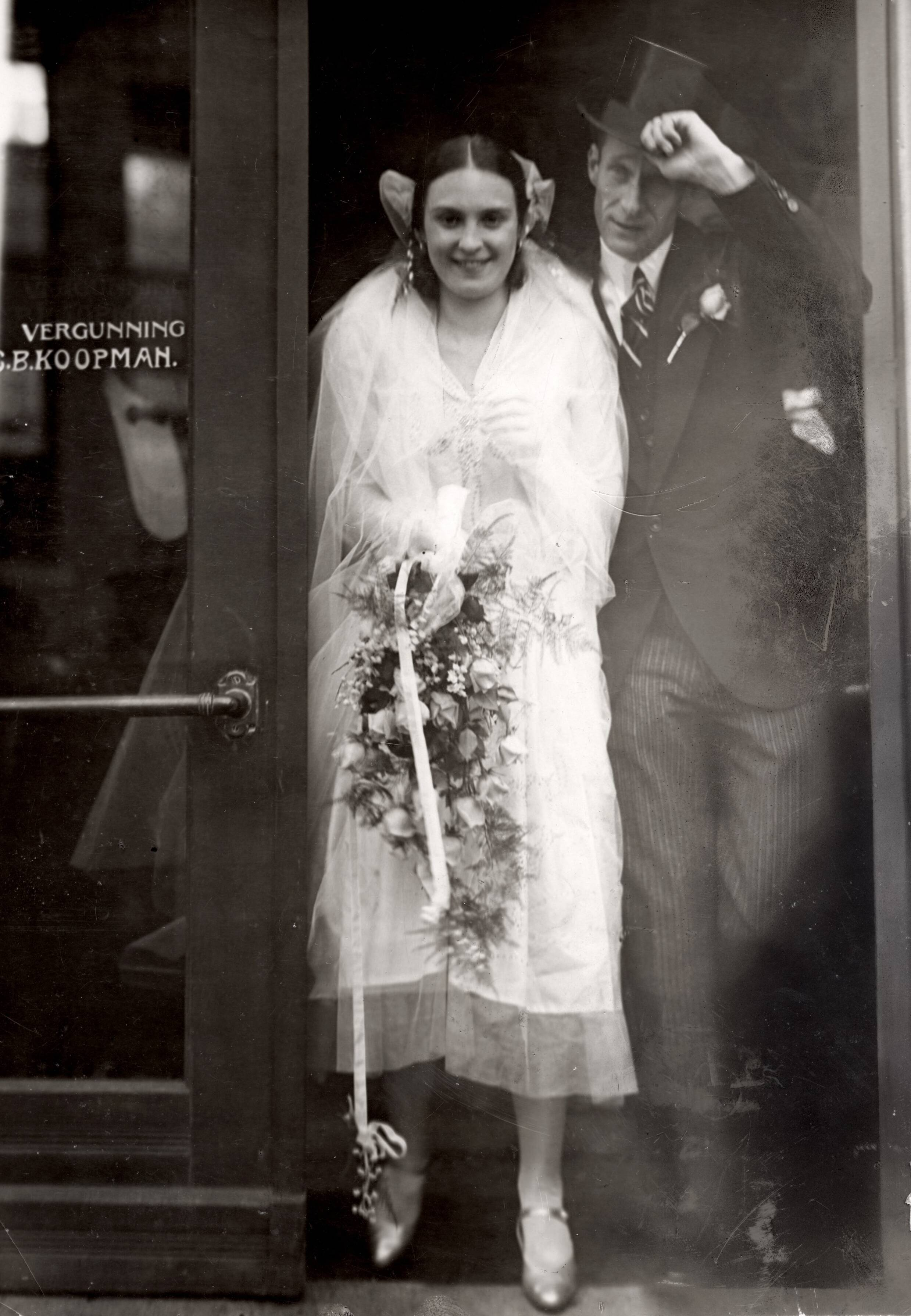 Miss Nederland/Holland. Miss Holland 1929 Johanna (Jopie) Koopman (1908-1981) trouwt in 1929 [op 30 oktober] met de voetballer Klaas Breeuwer. Zij is de dochter van de bekende Zaankanter de uitbater Carel Koopman van 'de Nieuwe Karseboom' op de Dam in Zaandam. Foto : het bruidspaar verlaat het café-restaurant in Zaandam.